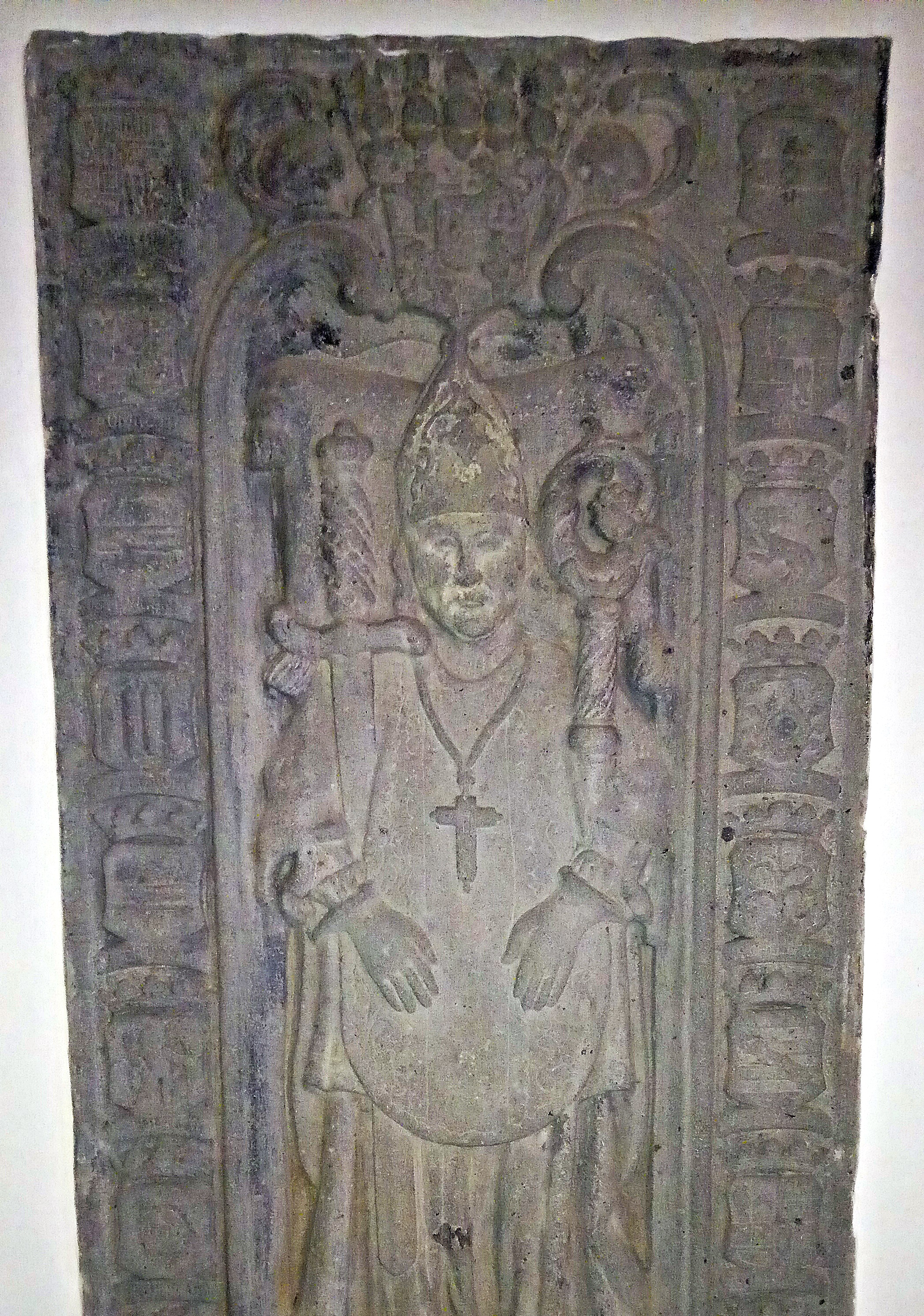 Abtei Michaelsberg, Siegburg, Krypta, Grabplatte Abt Heinrich Ferdinand Dietrich Gottfried von Schaumberg (+ 1779)